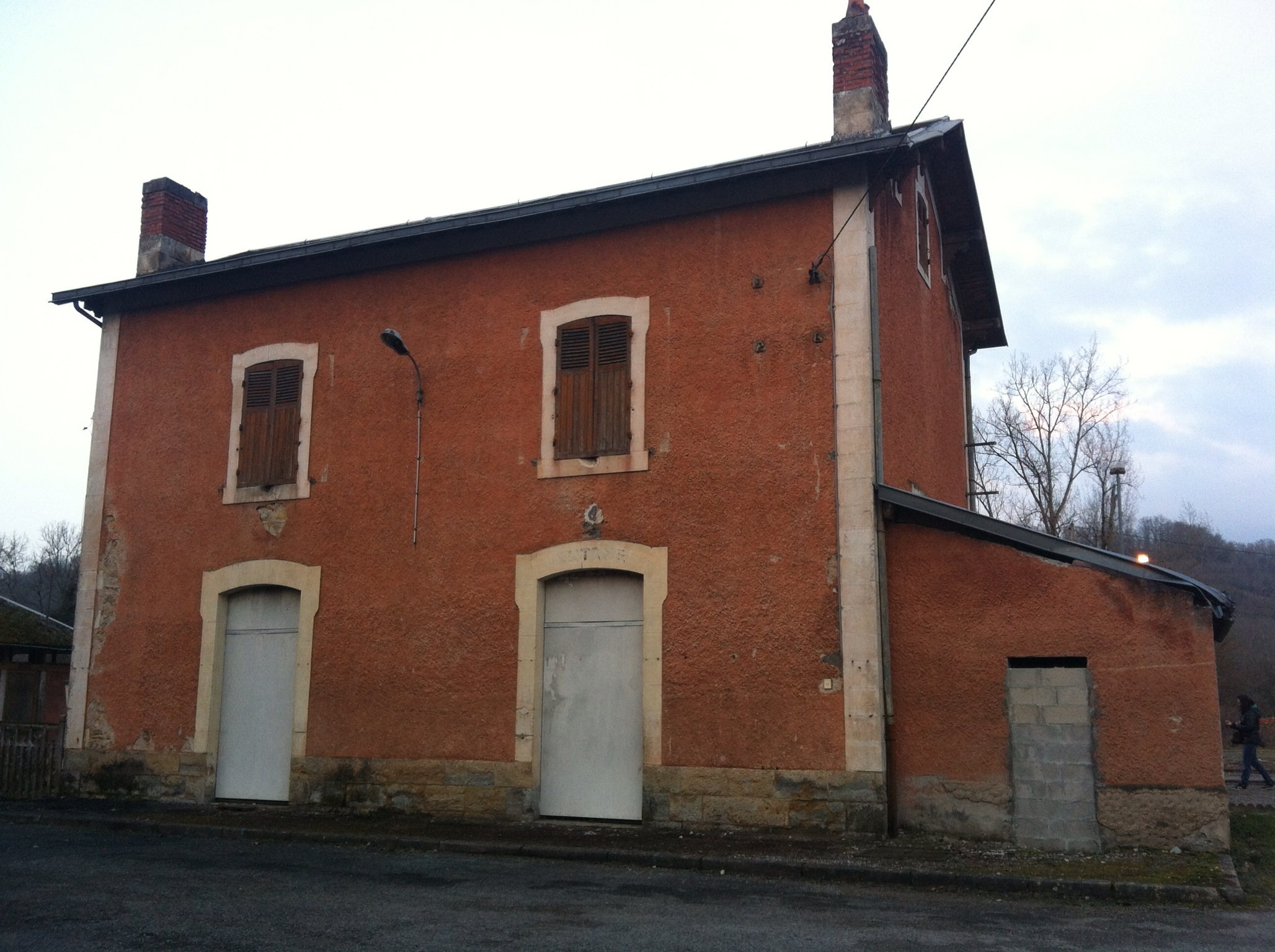 BV face parking